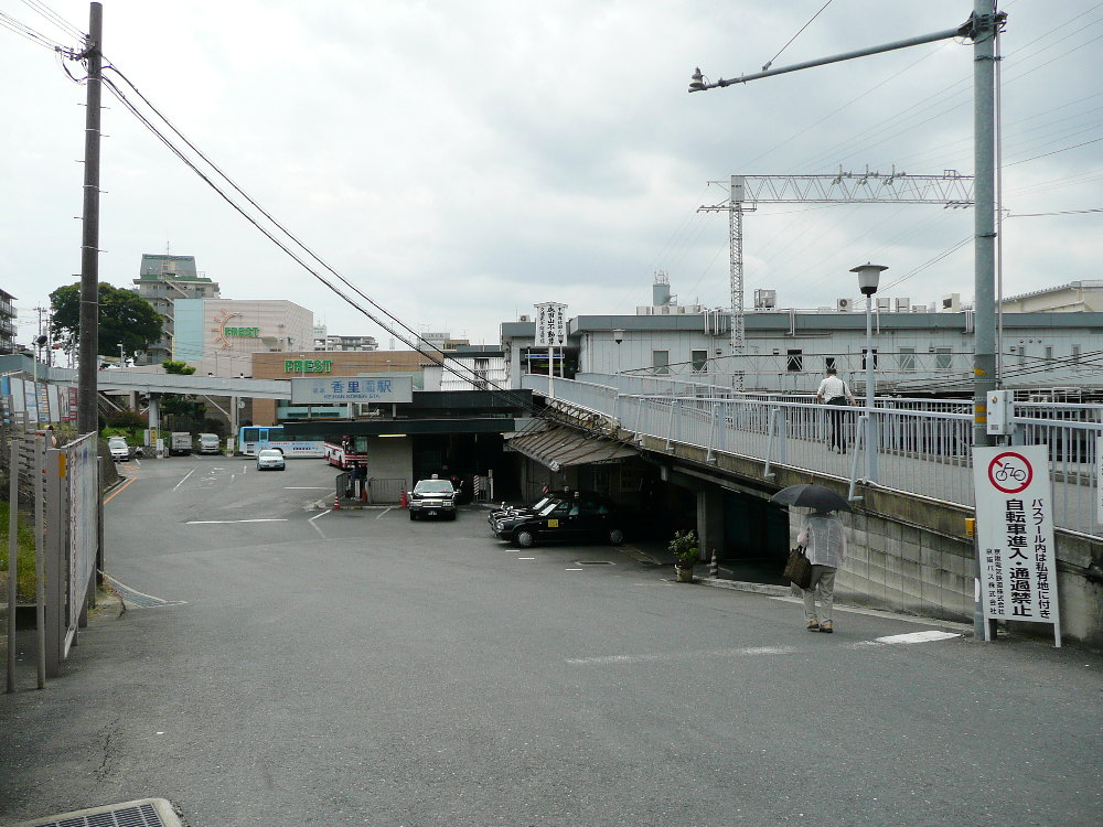 香里園駅